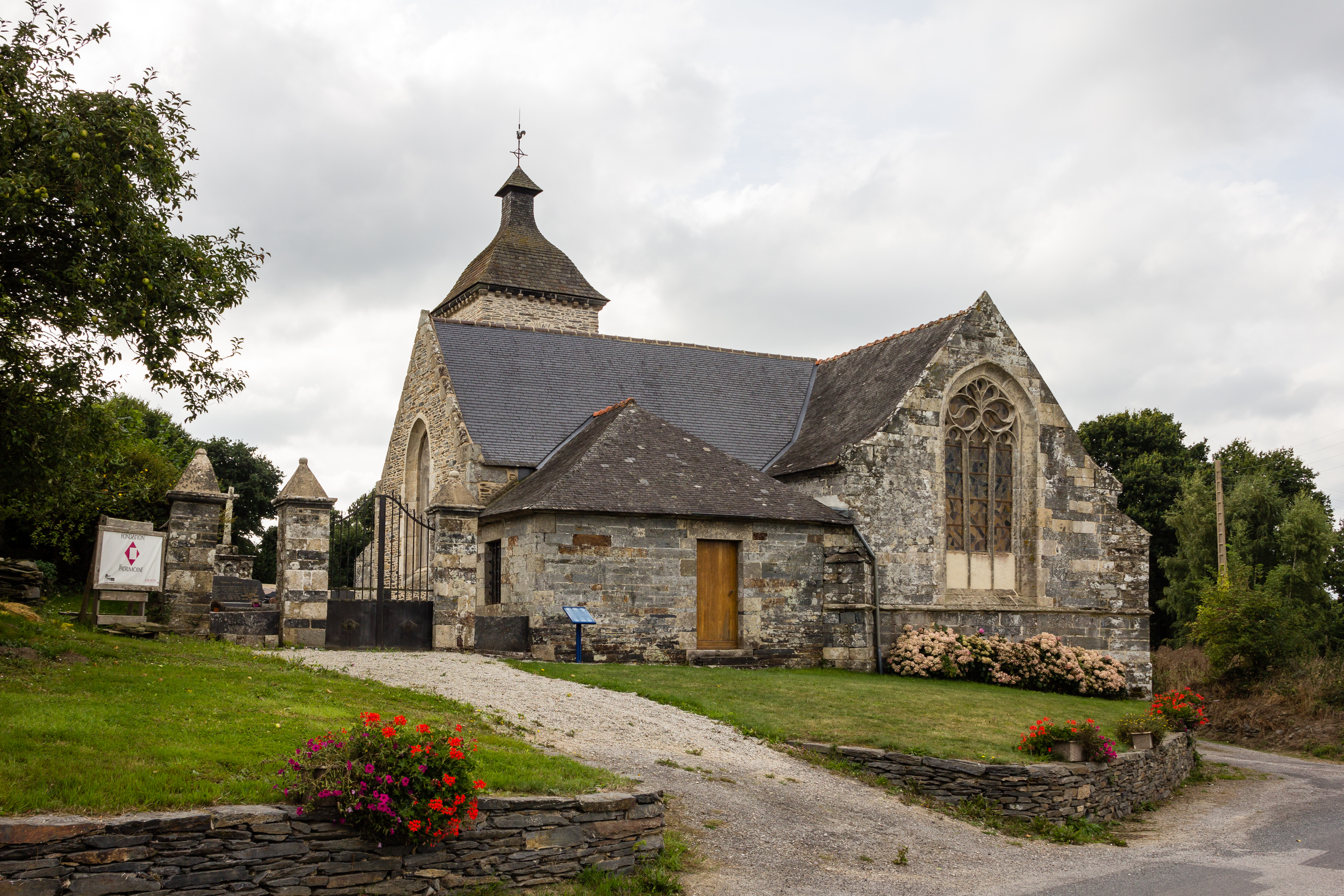 Chapelle Notre-Dame (Rosquelfen, Laniscat, France)